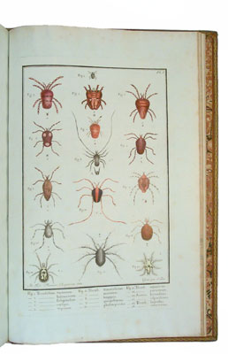 Plate from . Mémoire Aptérologique. Publié par F.L. Hammer. Strasbourg, F.G. Levrault, An XII (1804)